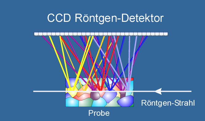 Roentgen-CCD (Ein Testobjekt wird mit einem Röntgenstrahl beschossen und die Streu-Strahlung mit einem CCD aufgenommen.